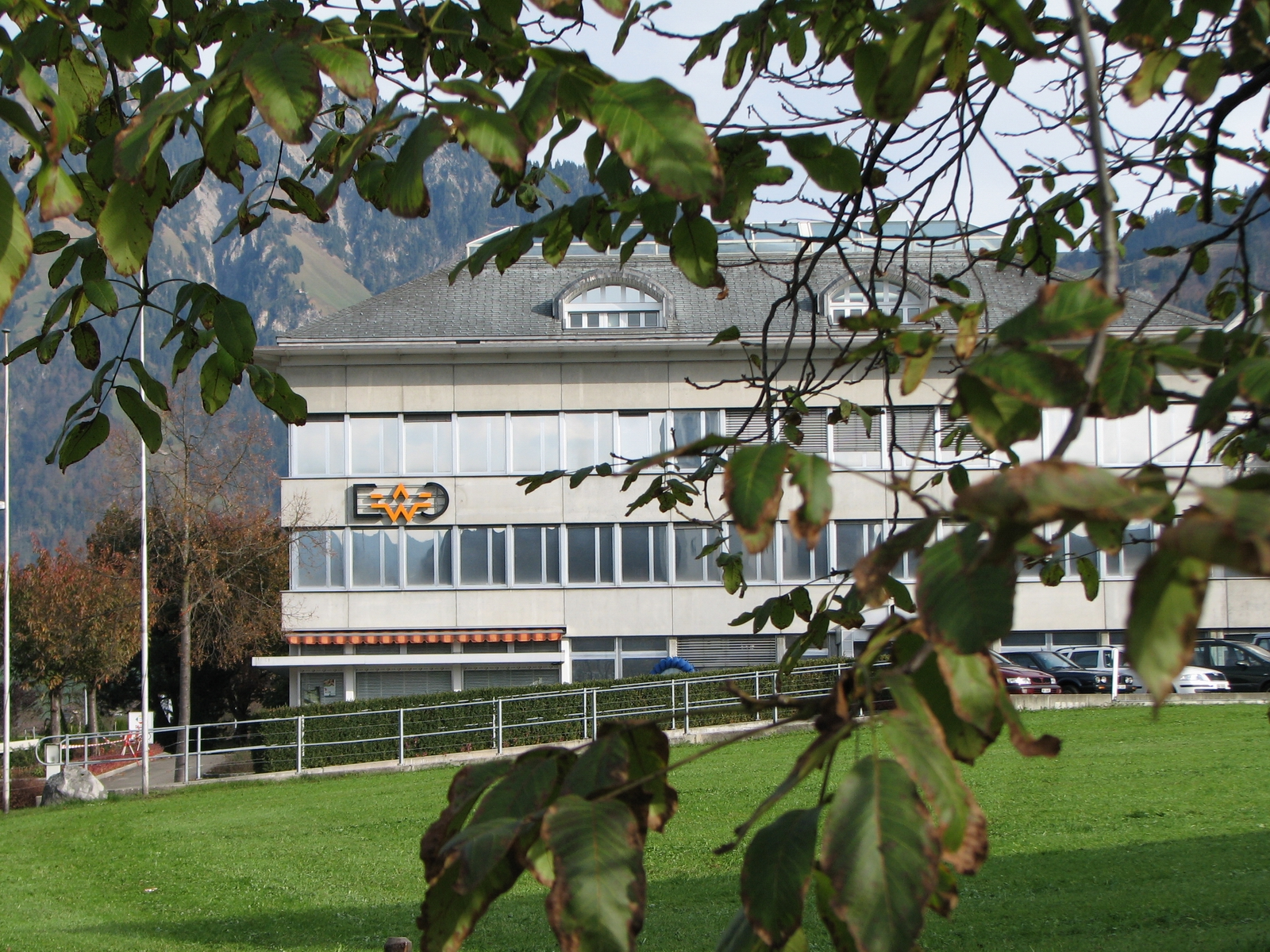 Verwaltungsgebäude des Elektrizitätswerks Obwalden